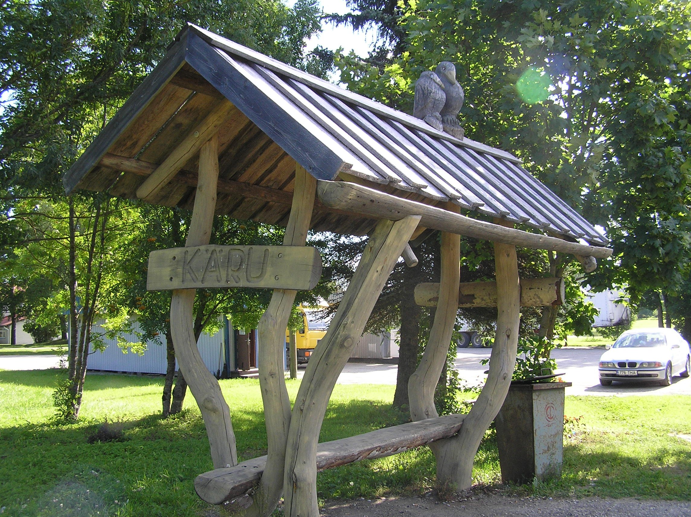 Käru tee bussipeatus